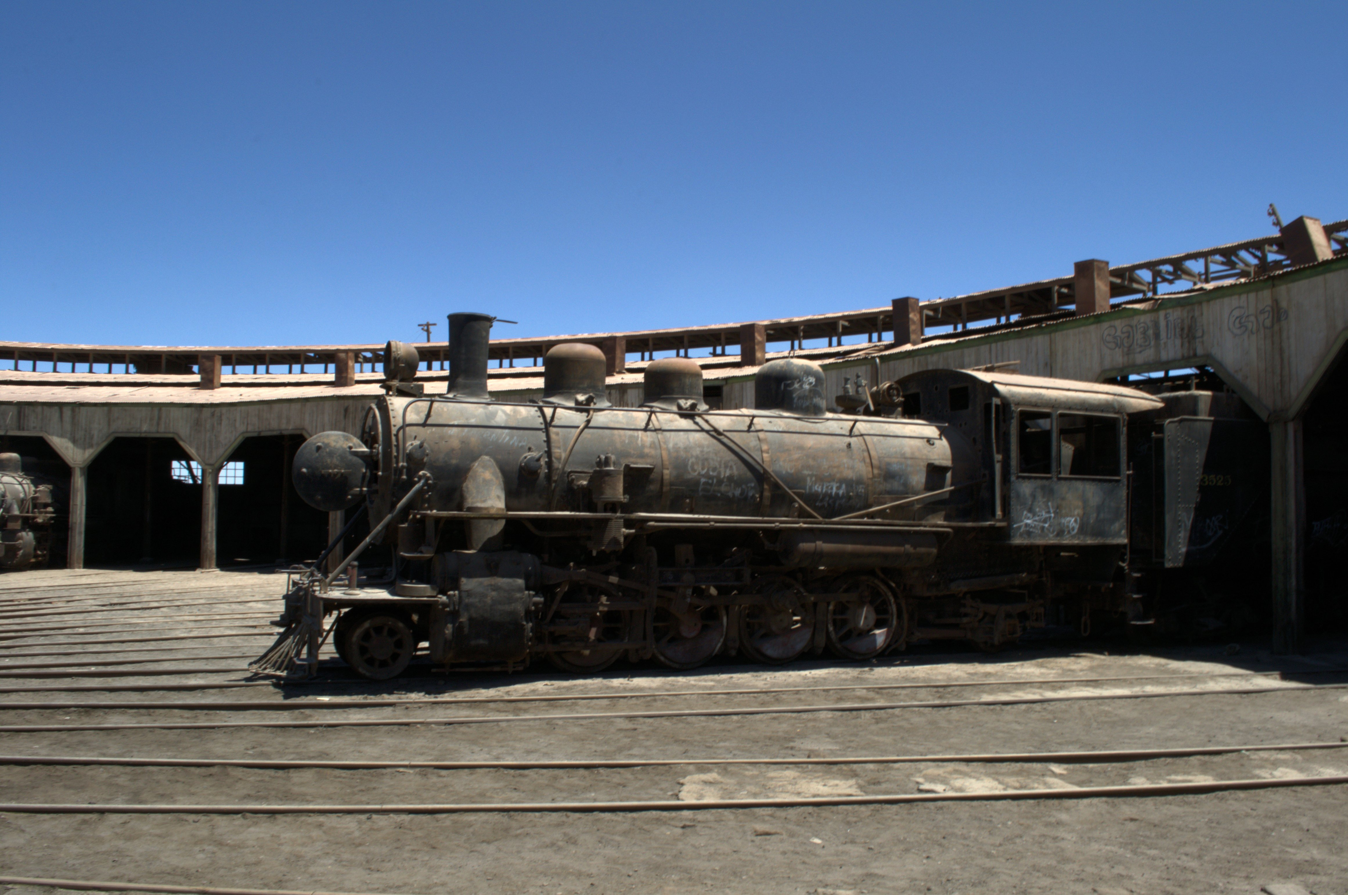 Construcciones y material rodante ferroviario de Baquedano This is a photo of a national monument in Chile: 542